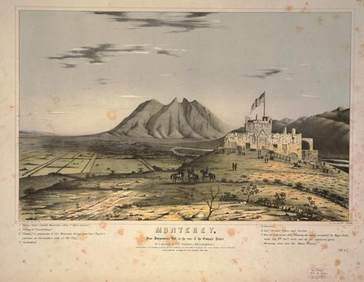 Estampa de 1847. Titulada Monterey from Independence Hill, in the rear of the bichop’s palace. Litografía de F. Swinton, coloreada por G. & W. Edicott, Nueva York. No sé por qué el obispado aparece sin cúpula. Ondea la bandera norteamericana después de la batalla de Monterrey en septiembre de 1846. Las tropas americanas permanecieron en territorio mexicano hasta 1848. La imagen tiene Copyright por D.P. Whiting. Pero, según las leyes de USA éste expira a los 100 años y pasa a ser imagen del Dominio Público. Otras cuantas litografías de la batalla de Monterrey se encuentran en: The Library of Congress of the United States Prints & Photographs Online Catalog Ese link puede ayudar